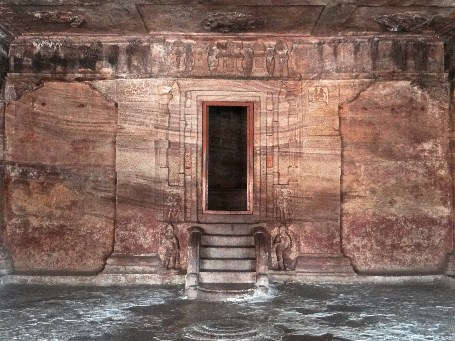 Le sanctuaire du grand temple troglodytique dédié à Vishnou (grottes de Badami) Ce temple, creusé dans le rocher et dédié à Vishnou, date de 578, c'est le plus grand et le plus beau des quatre temples en raison de la qualité des groupes sculptés (en consoles) et des reliefs sur les parois. Wikipedia sur Badami